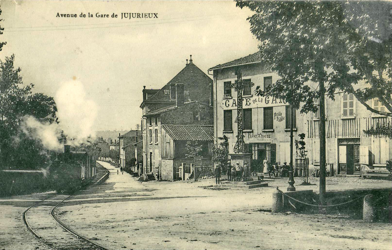 Carte postale ancienne éditée par Corne : JUJURIEUX - Avenue de la Gare